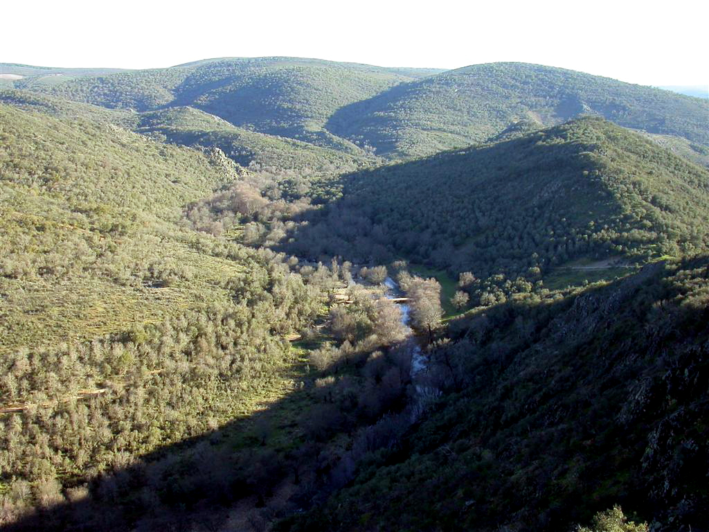 Monte mediterráneo, Parque Nacional de Cabañeros